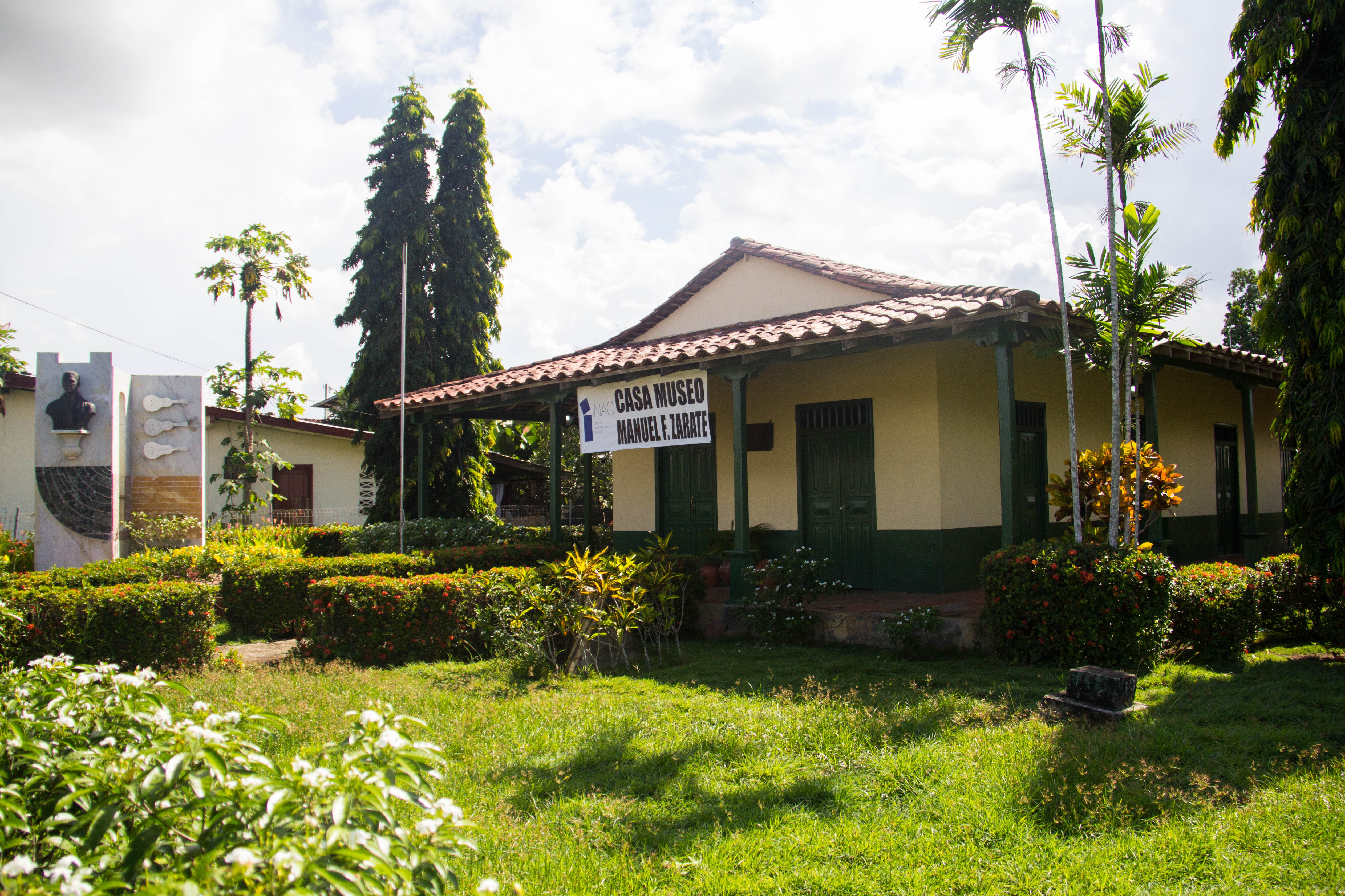 El 11 de mayo de 1969, un grupo de habitantes de diversos pueblos de las provincias de Los Santos, Herrera y Veraguas se congregaron en el pueblo de Guararé para, en el mismo solar donde había nacido el profesor Manuel F. Zárate, edificar una casa donde habrían de conservarse y exhibirse documentos y objetos vinculados a la magnífica labor de investigación y divulgación folklórica hecha por este notable panameño. El Museo Manuel F. Zárate, declarado Monumento Nacional mediante el Decreto de Gabinete N°. 294 del 4 de septiembre de 1969 fue inaugurado el 24 de septiembre de 1969; es una pequeña casa con paredes de quincha techo de madera y tejas y piso de baldosas. Un agradable portal la circunda. Su interior se encuentra dividido en dos salas. En el pequeño y sencillo jardín de este museo se localiza un busto suyo que, realizo en bronce por el escultor nacional Carlos Arboleda, fue inaugurado el 25 de septiembre de 1979.